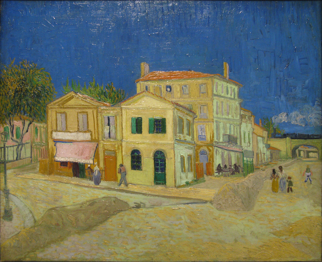 Het gele huis, 1888 Vincent van Gogh (1853-1890) Olieverf op doek, 72 X 91.5 cm Van Gogh Museum, Amsterdam (Vincent van Gogh Stichting) F 464